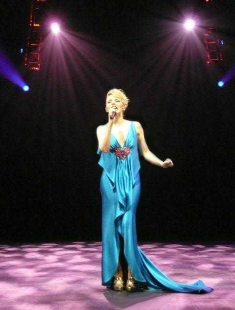 KylieX2008